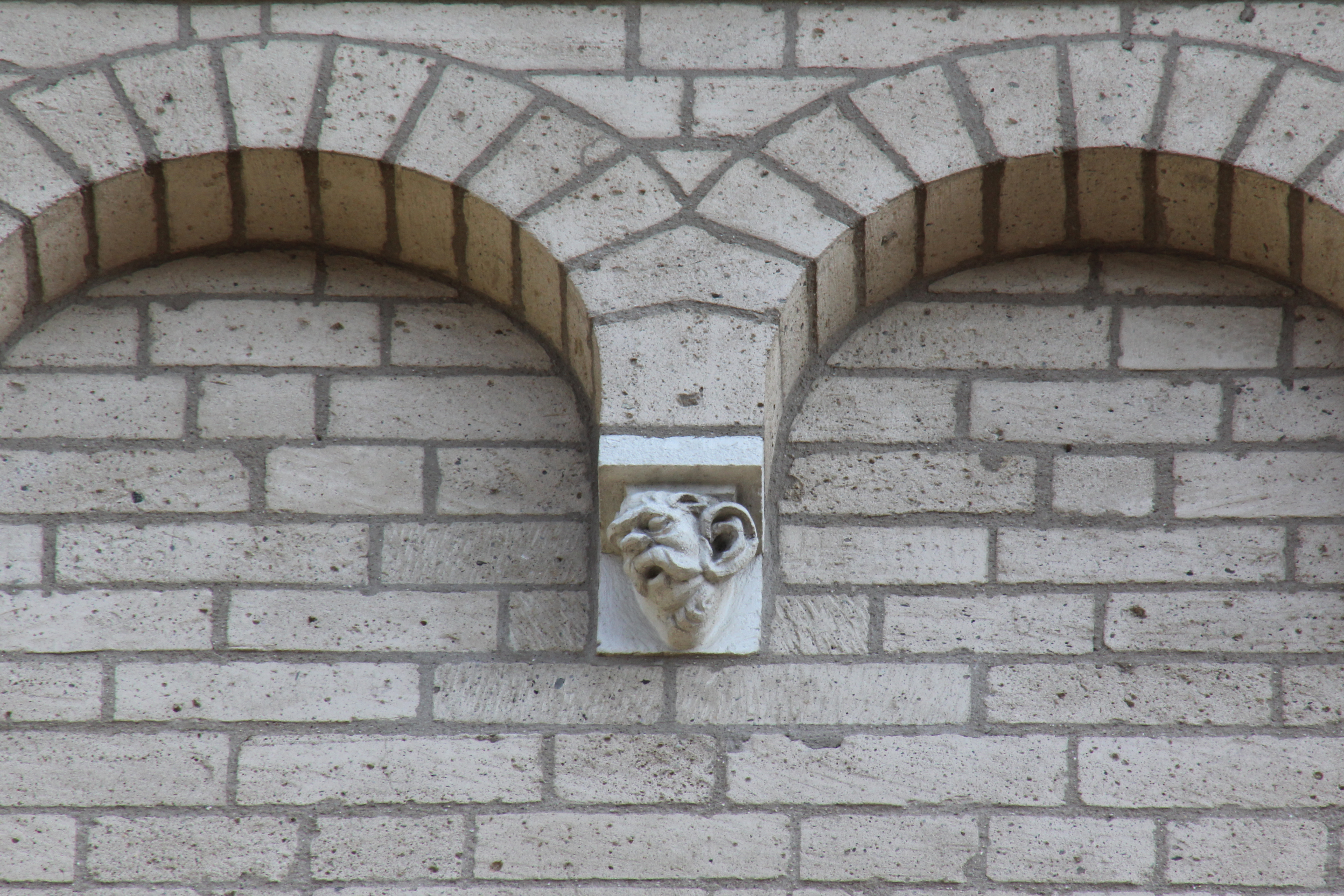 Kopf von Bismarck an der Westfassade von St. Andreas in Köln This is a photograph of an architectural monument.